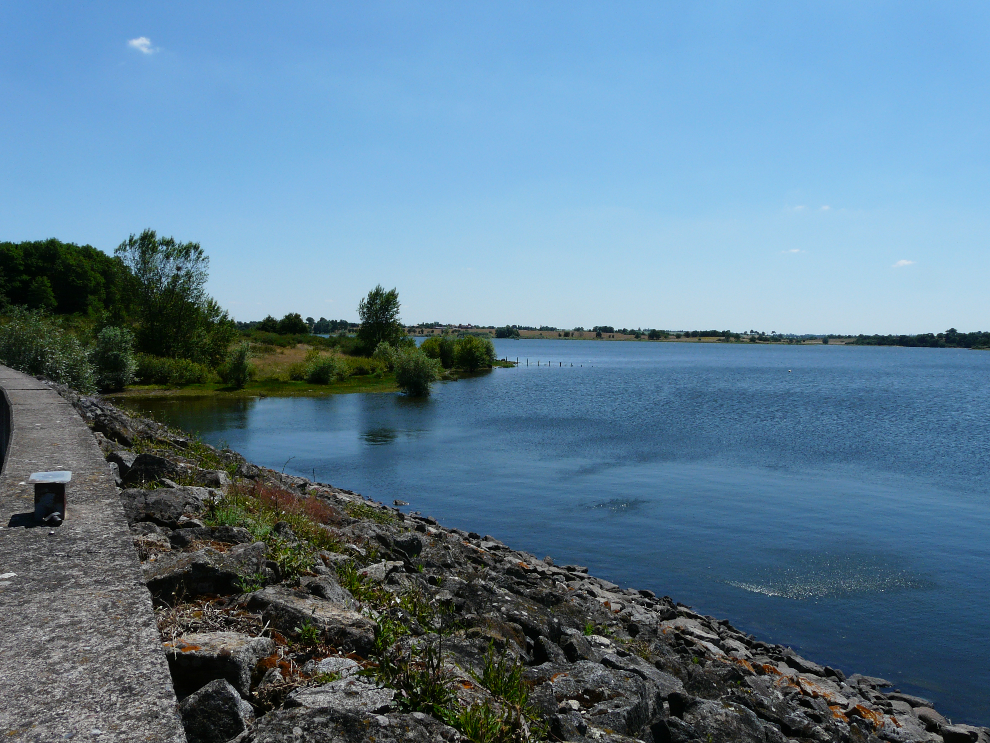 Le lac du Cébron vu depuis la digue du barrage du Cébron, communes de Gourgé et Saint-Loup-Lamairé, Deux-Sèvres, France